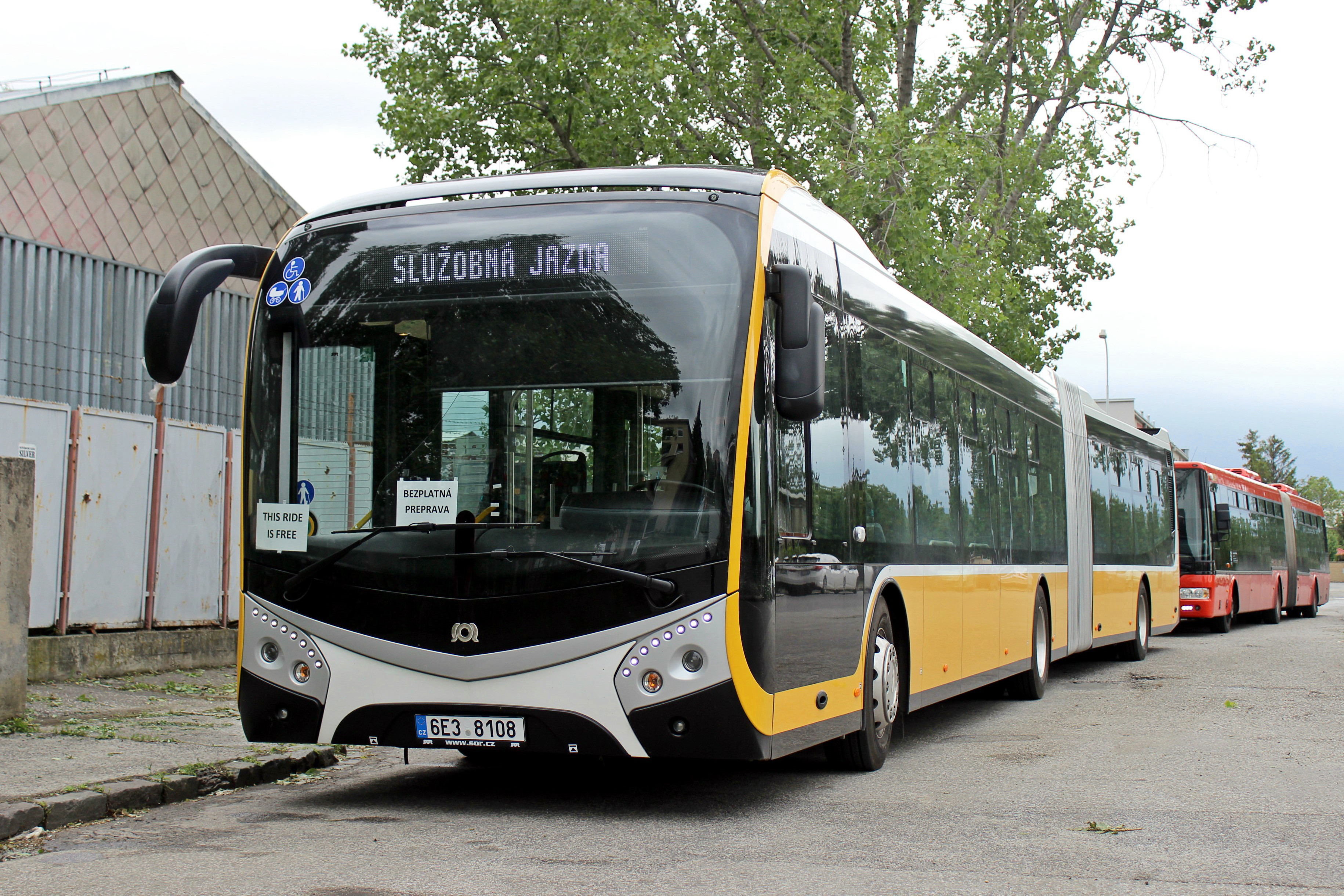 SOR NS 18 na testovaní v Bratislave.